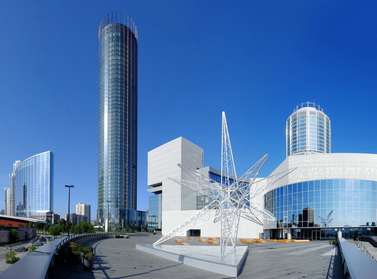 Терраса перед Ельцин-центром. На заднем плане отель Hyatt Regency, Башня "Исеть", Деловой дом "Демидов". По центру кадра - арт-объект "Звезда"